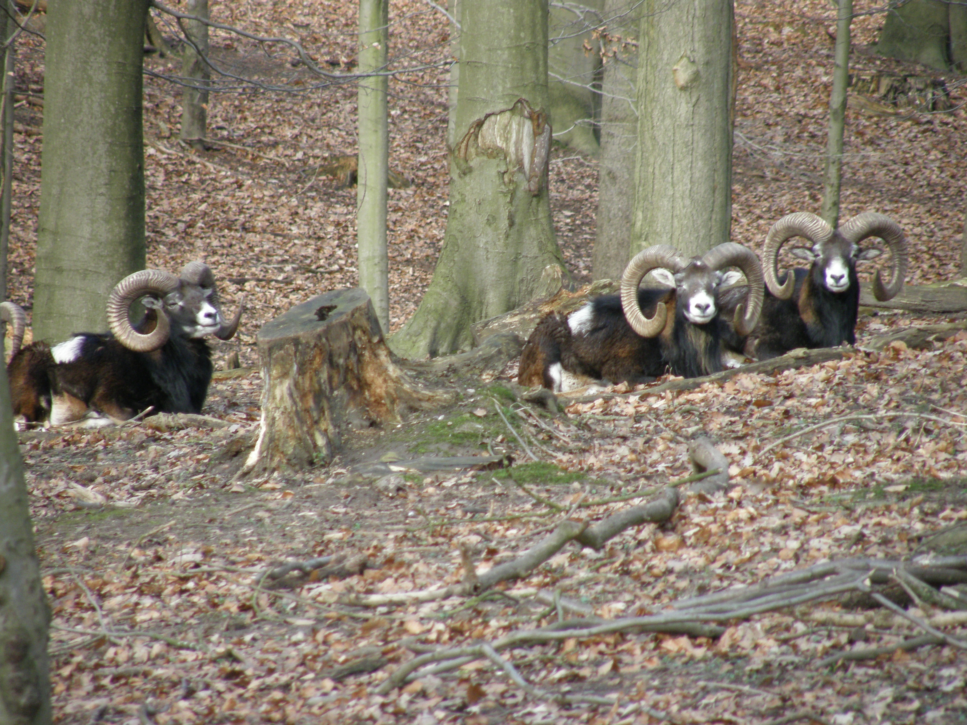 Muffelwild (Ovis ammon musimon) in einem Wald bei Kiel nahe dem Kiel-Kanal